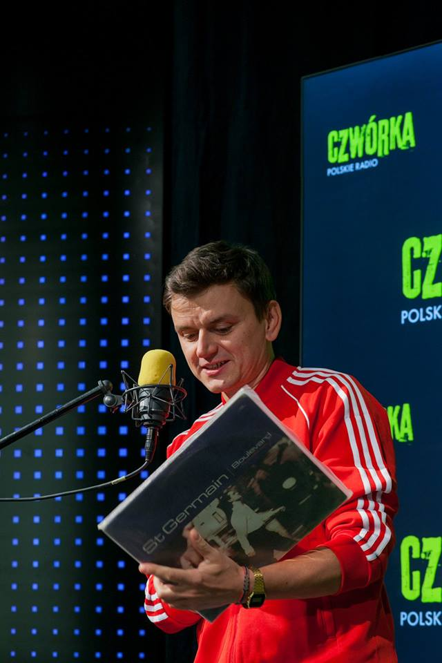 Łukasz Stachurko AKA Sonar Soul w Czwórce z okazji Record Store Day.